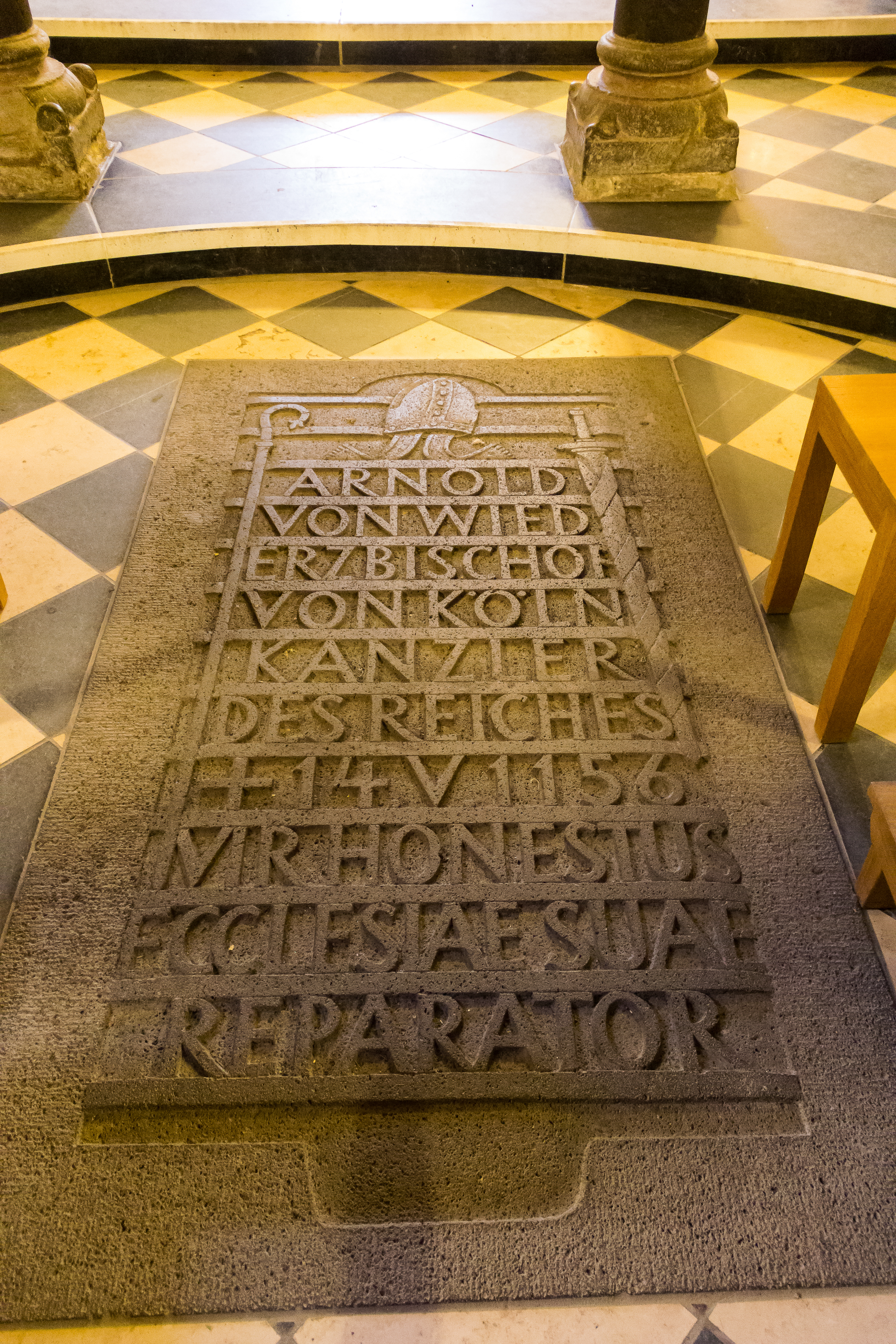 Die romanische Doppelkirche St. Maria und Clemens in Schwarzrheindorf; Innenansicht, Grabplatte des Kölner Erzbischof Arnold von Wied